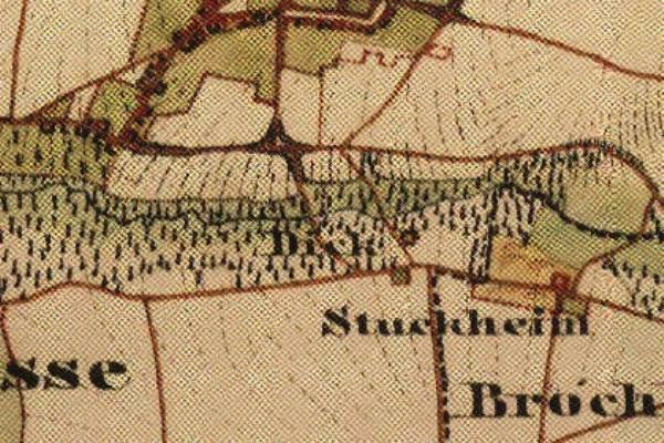 Preußische Kartenaufnahme 1846 - Uraufnahme